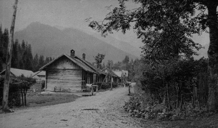 Tatranská Javorina